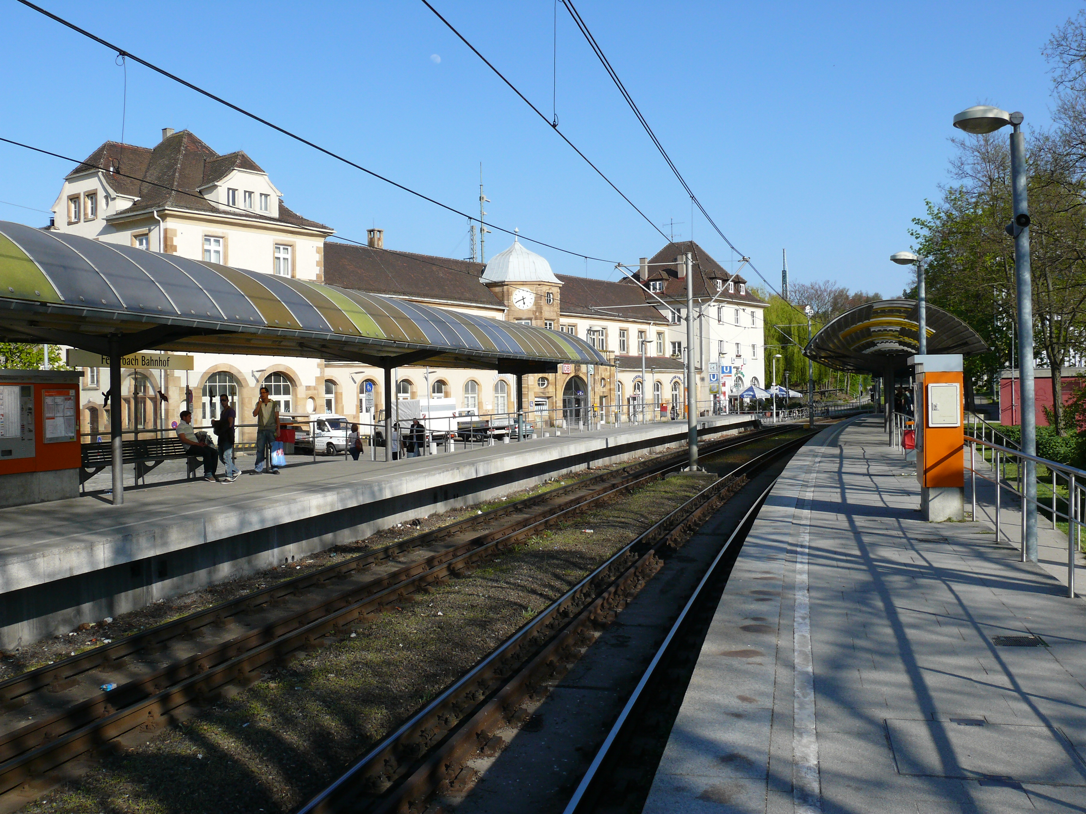 Die Stadtbahnhaltestelle Feuerbach Bahnhof in Stuttgart.